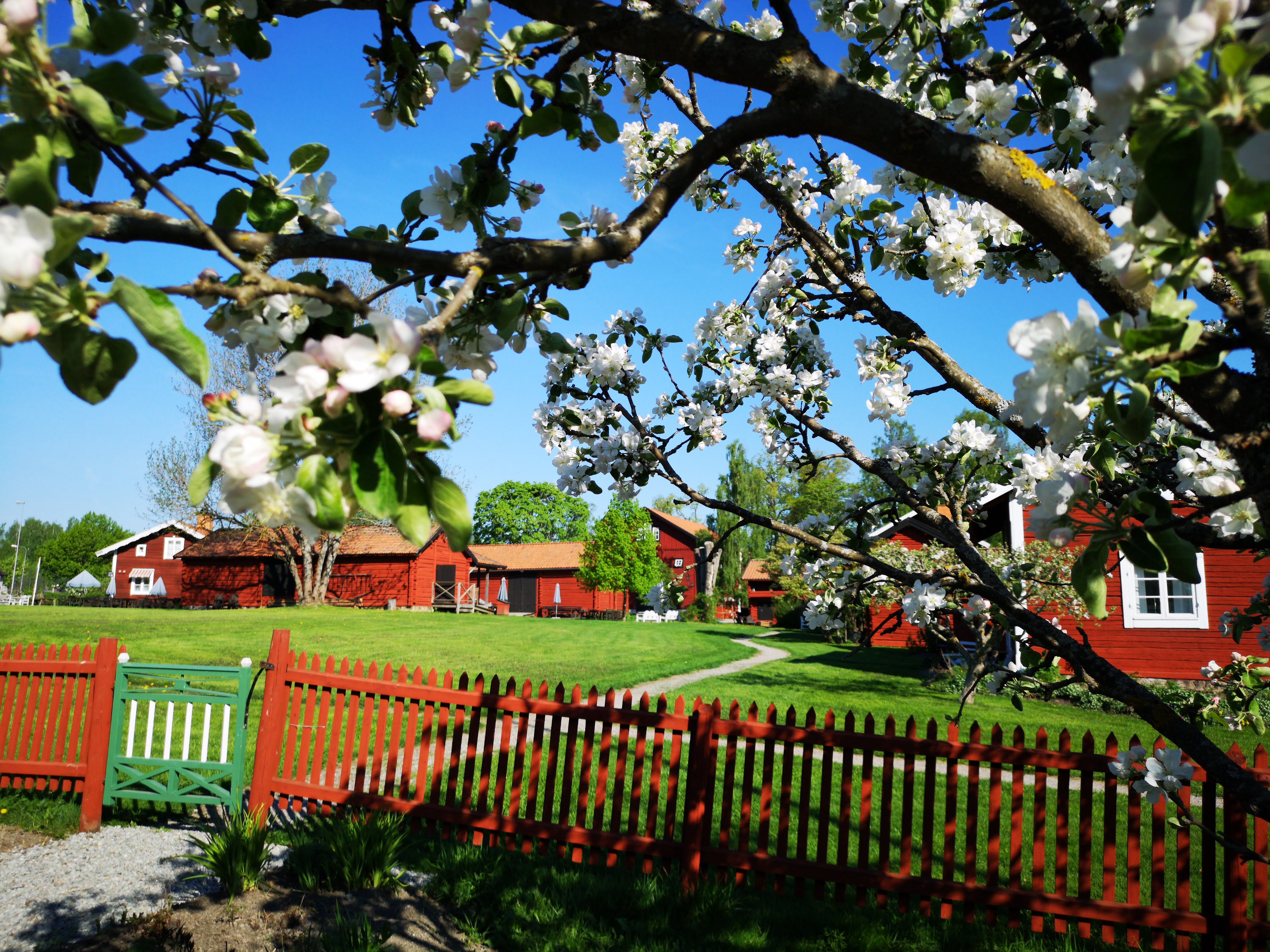 Sveriges mest öppna hembygdsgård, öppen 364 dagar om året.